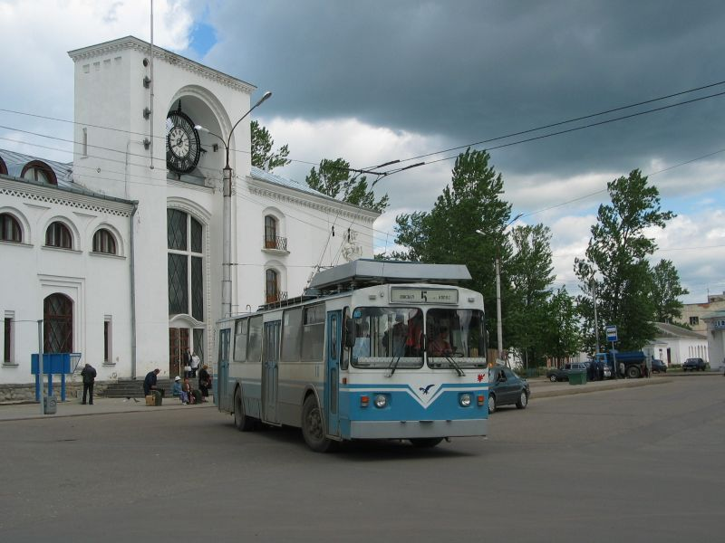 Троллейбус «ЗиУ-682» 5-го маршрута на Вокзальной площади в Великом Новгороде.